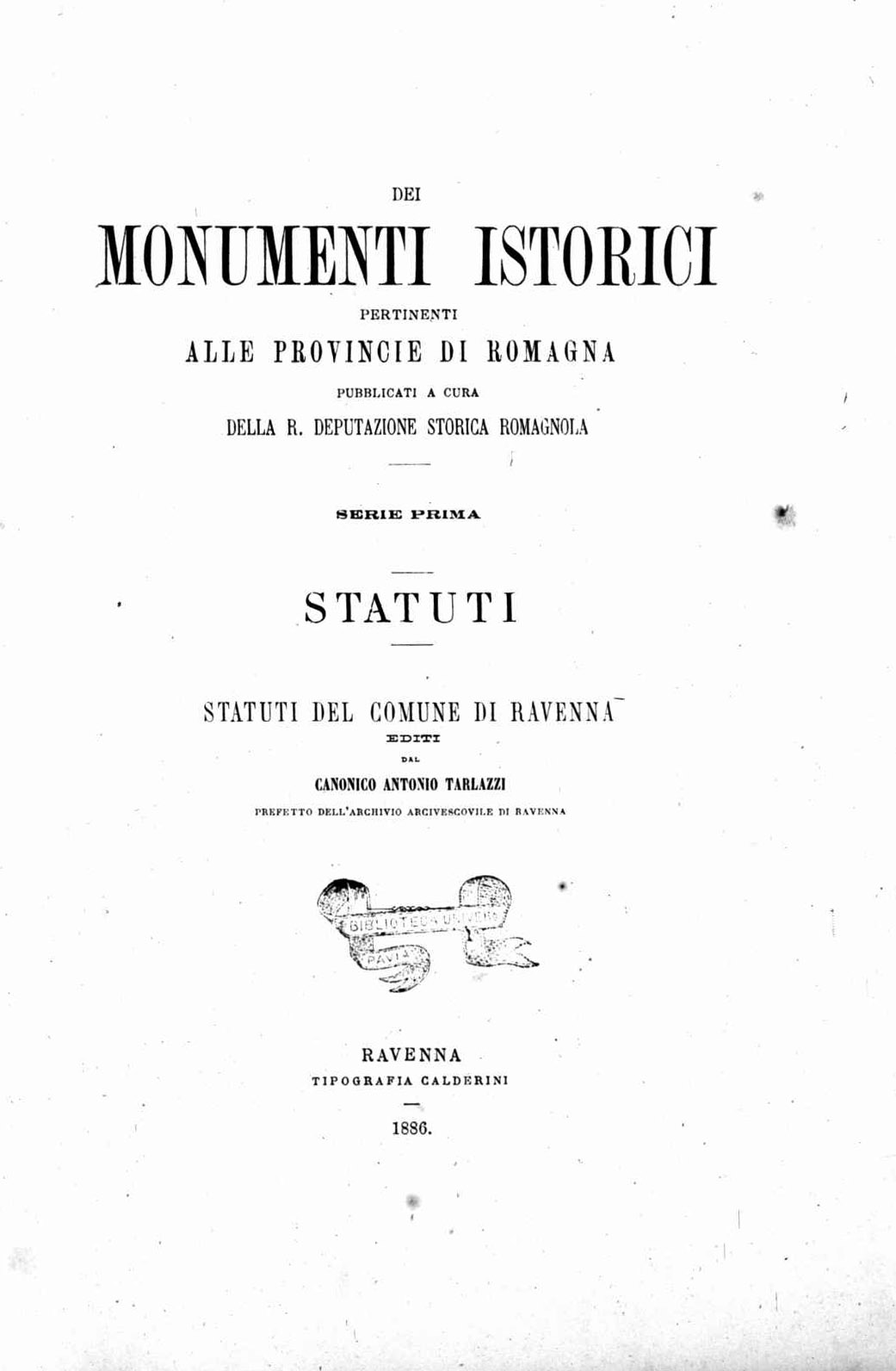 Frontespizio